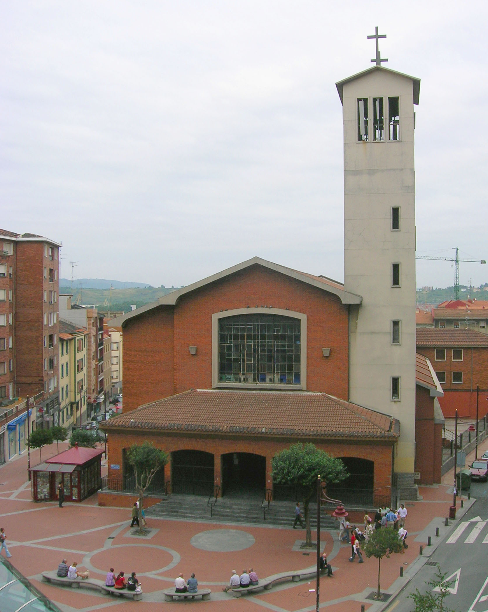 Iglesia parroquial de Santa Teresa, en el barrio de Bagaza, Barakaldo, Vizcaya (Baracaldo (España)).